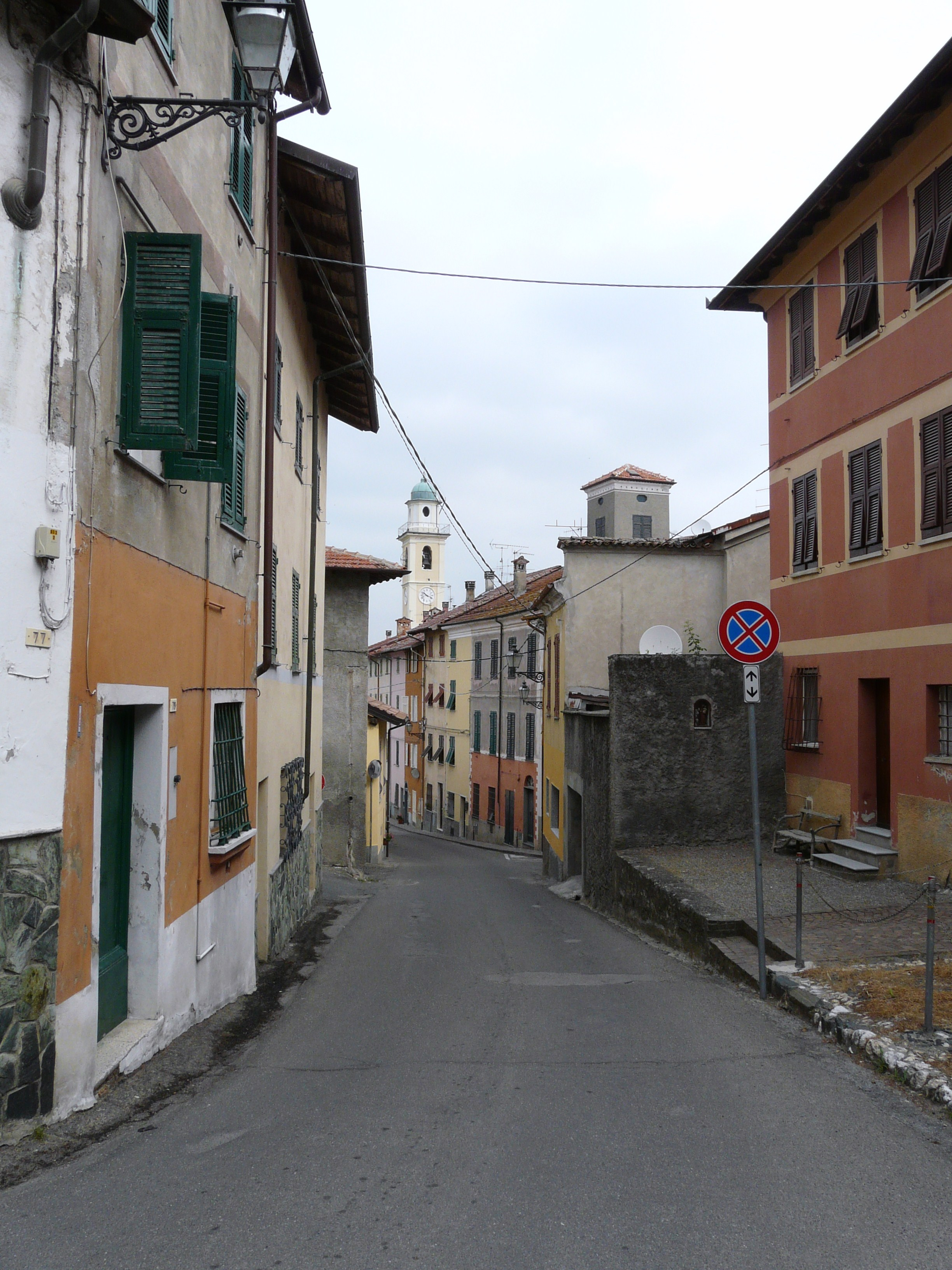 Carrosio, Piemonte, Italia